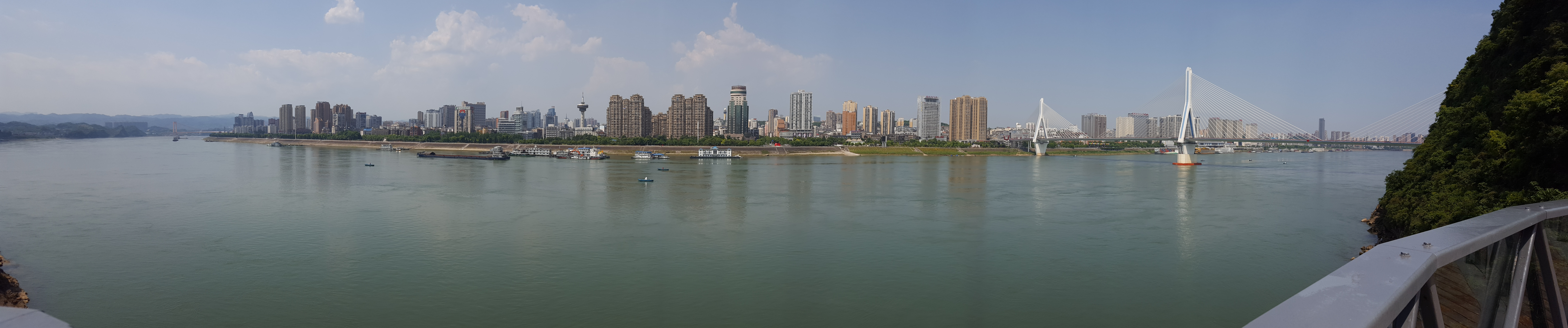 从磨基山公园观景台拍摄的宜昌天际线